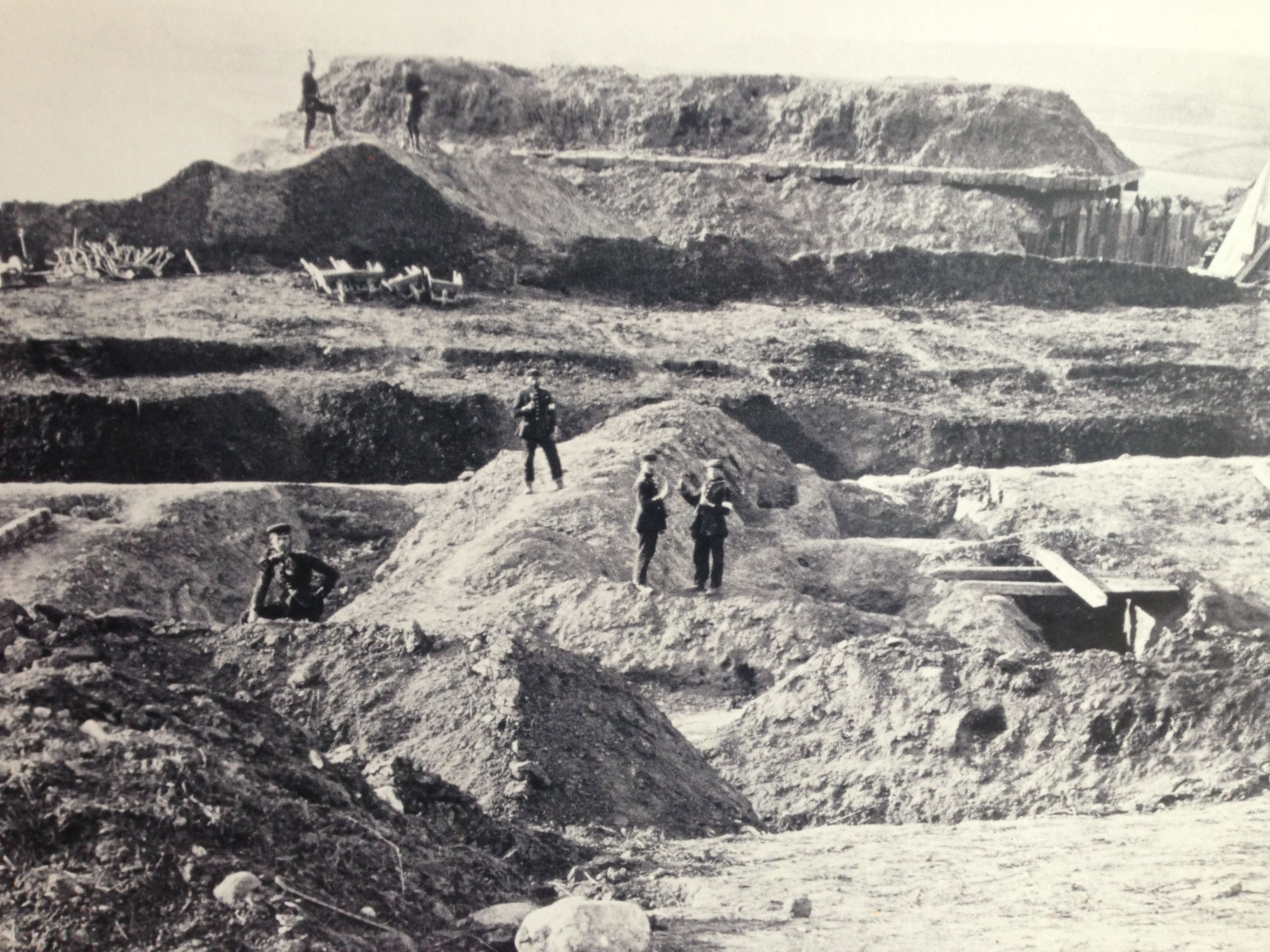 Preussische Soldaten auf der Schanzenanlage in Düppeln nach der Erstürmung